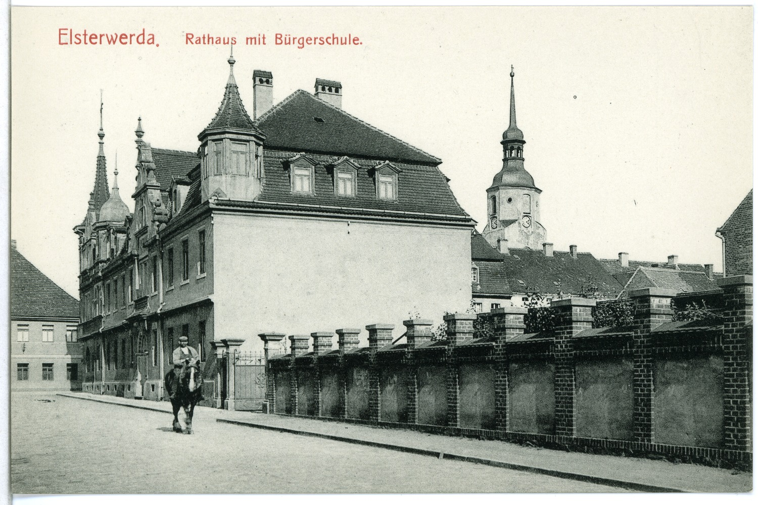 Elsterwerda; Rathaus mit Bürgerschule This postcard is from publisher Brück & Sohn in Meißen ( postcard has a unique number 11383 and is available in a higher resolution at the publisher. This images was uploaded in a cooperation project between Wikipedians and the publisher.